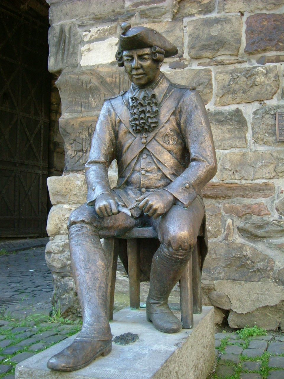 Denkmal für den "Öcher Penn" am Marschiertor